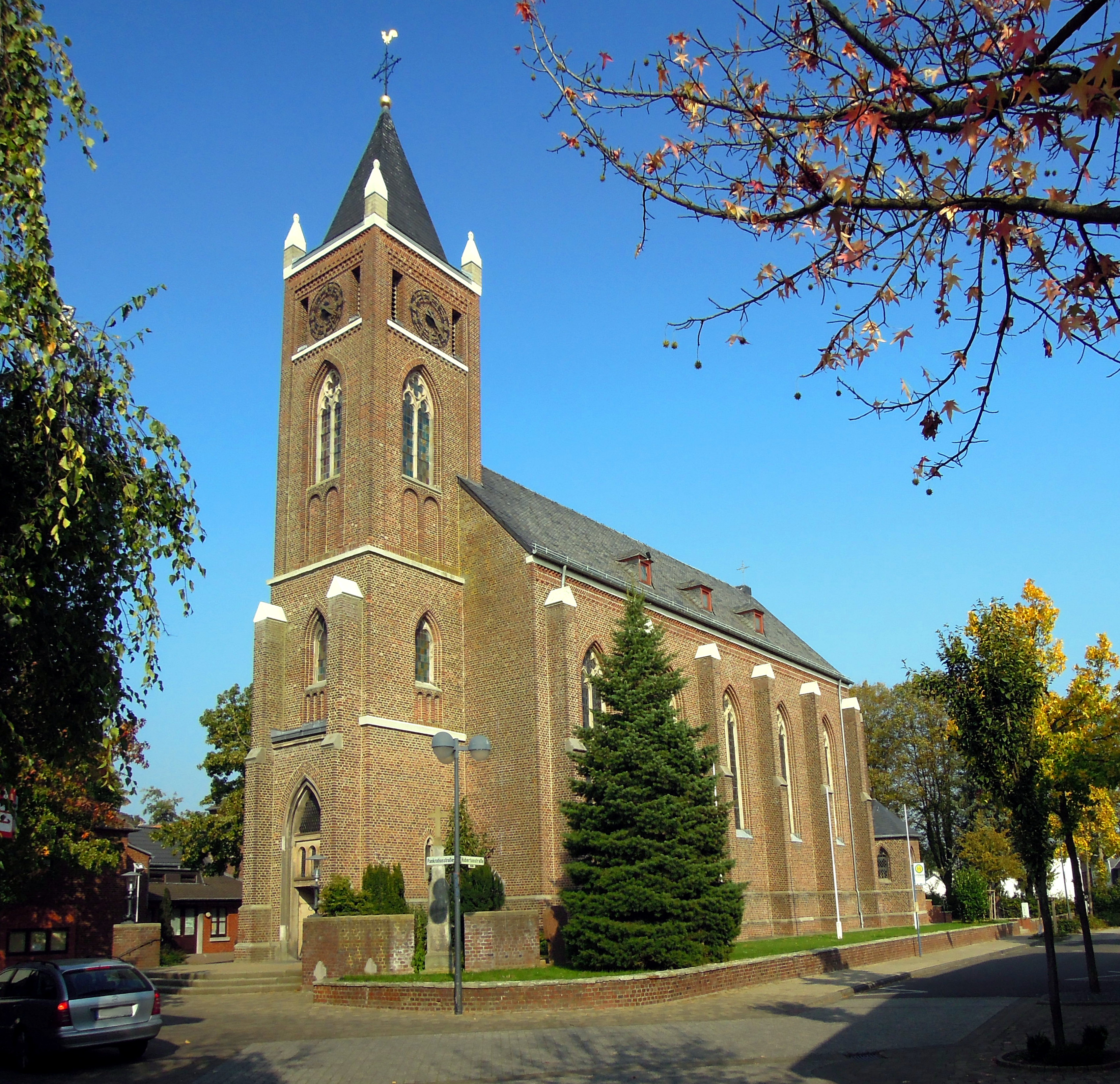 Kath. Kirche St. Pankratius in Beggendorf